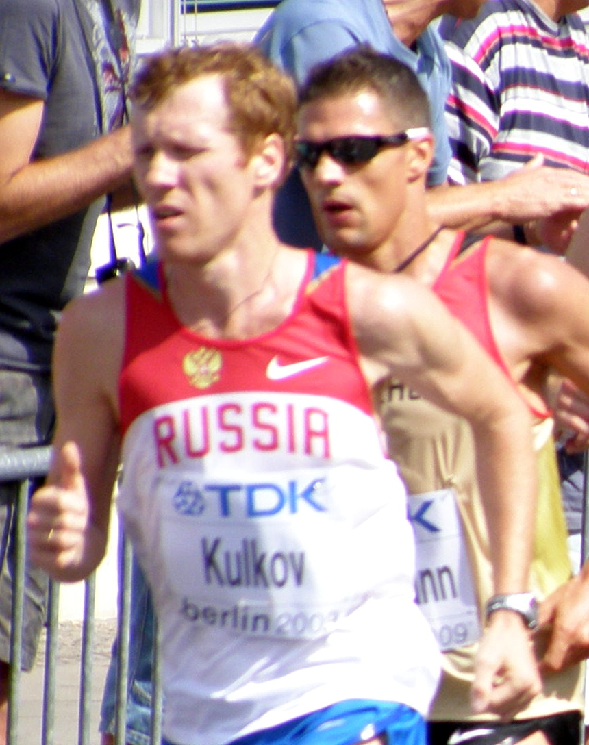 Leichtathletik Weltmeisterschaft, Berlin 2009, Marathon der Herren, auf dem Bild Oleg Kulkov, Martin Beckmann